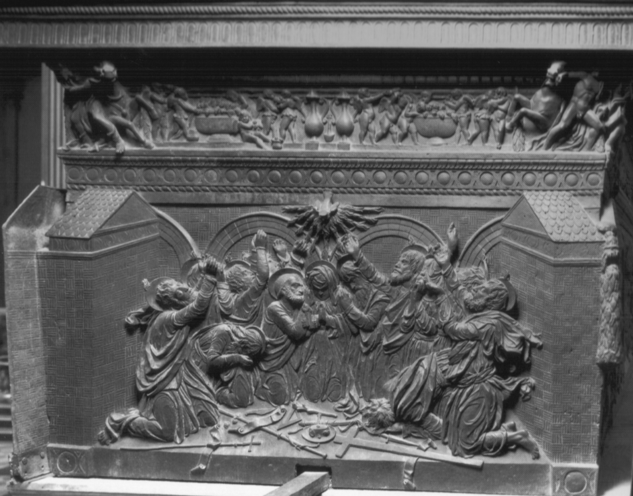 Il Pulpito della Resurrezione, in San Lorenzo a Firenze, opera di Donatello (1460s). Dettaglio: Pentecoste. - Fotografia Alinari, 1852.